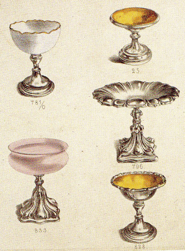 Ausschnitt aus einem Musterbuch von C. Deffner, Zuckervasen mit verschiedenen Füßen